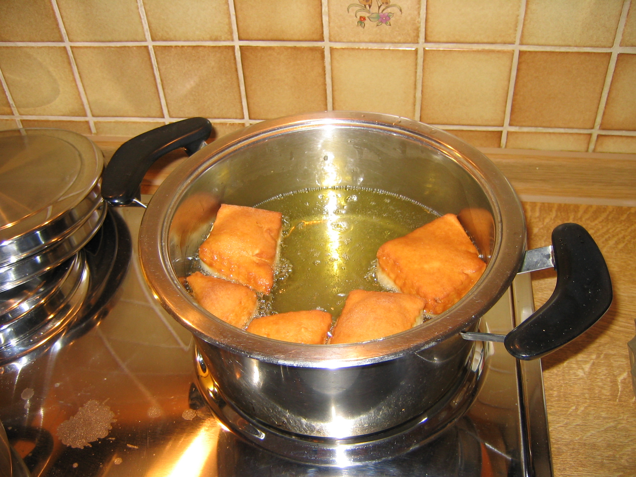 Fasnetsküchle - Schmalzgebäck, wie es in Baden zur Karnevalszeit zubereitet wird